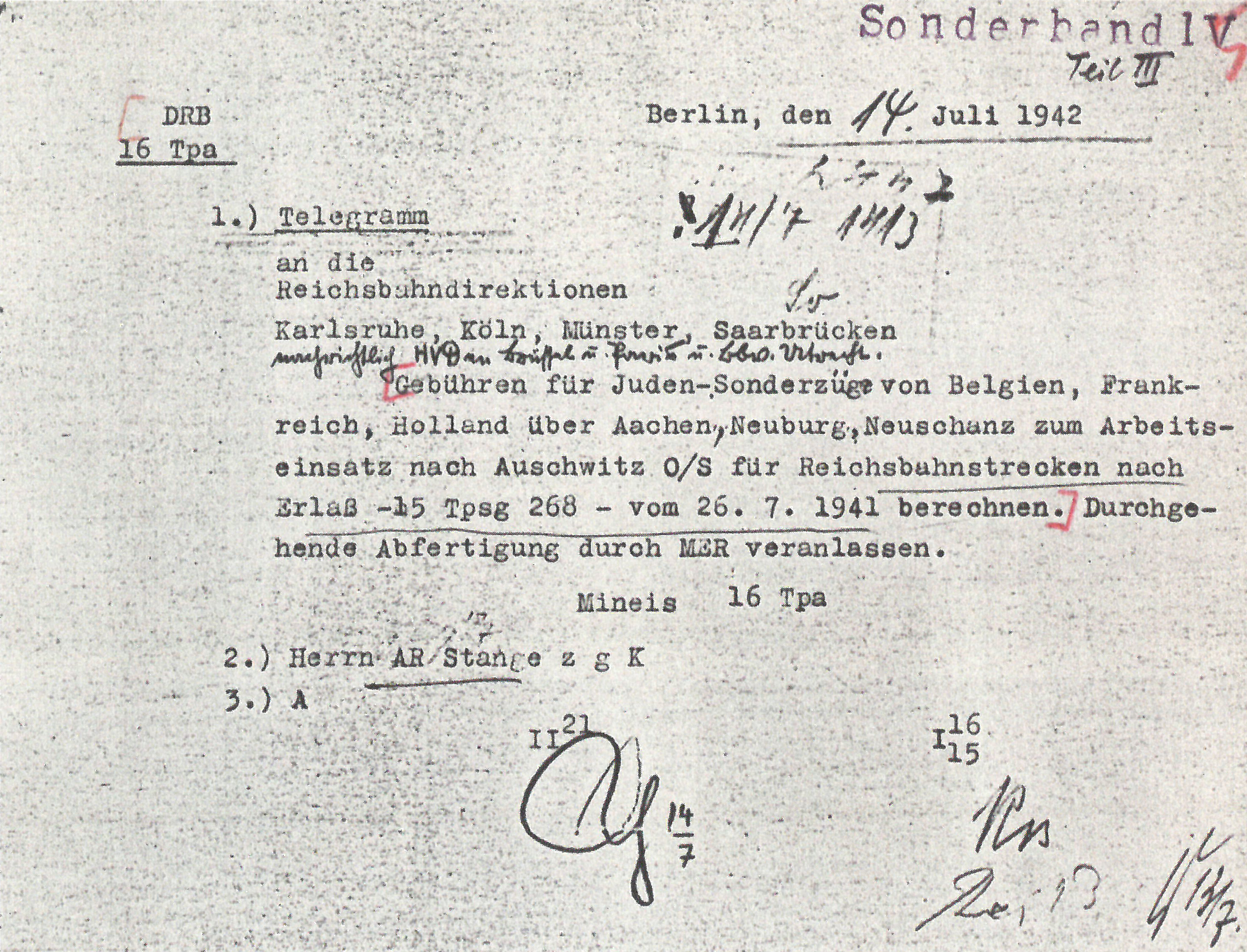 Telegramm der Reichsbahn (Referat für Personentarife) über zu berechnenden Gebühren für Deportationszüge. Die Unterlage hat Paul Schnell abgezeichnet und an seinen Sachbearbeiter für Reisesonderzüge, Amtsrat Otto Stange, zur Kenntnis geleitet.